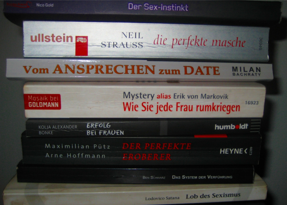 Eine Auswahl von Büchern zum Thema Seduction & Pickup